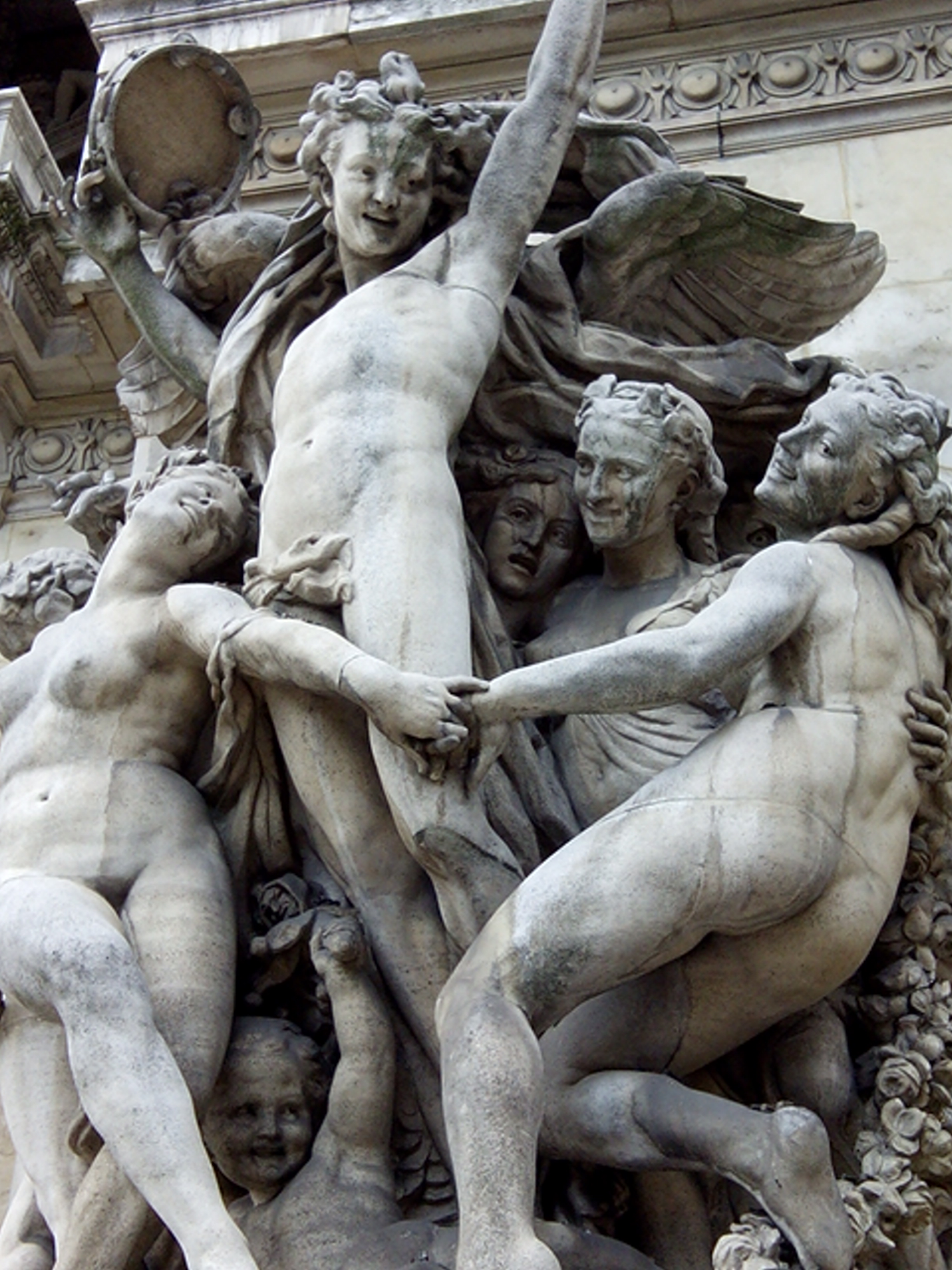 Detalle del edificio de la Ópera de París.